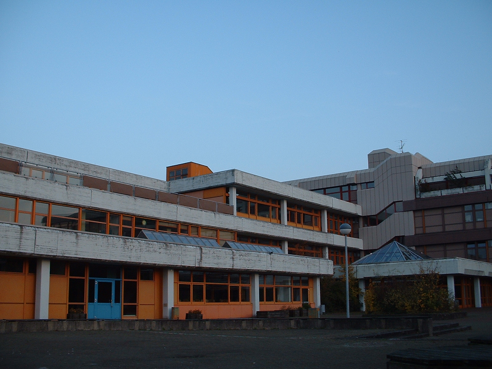 das Berufsbildungszentrum in Vöhrum